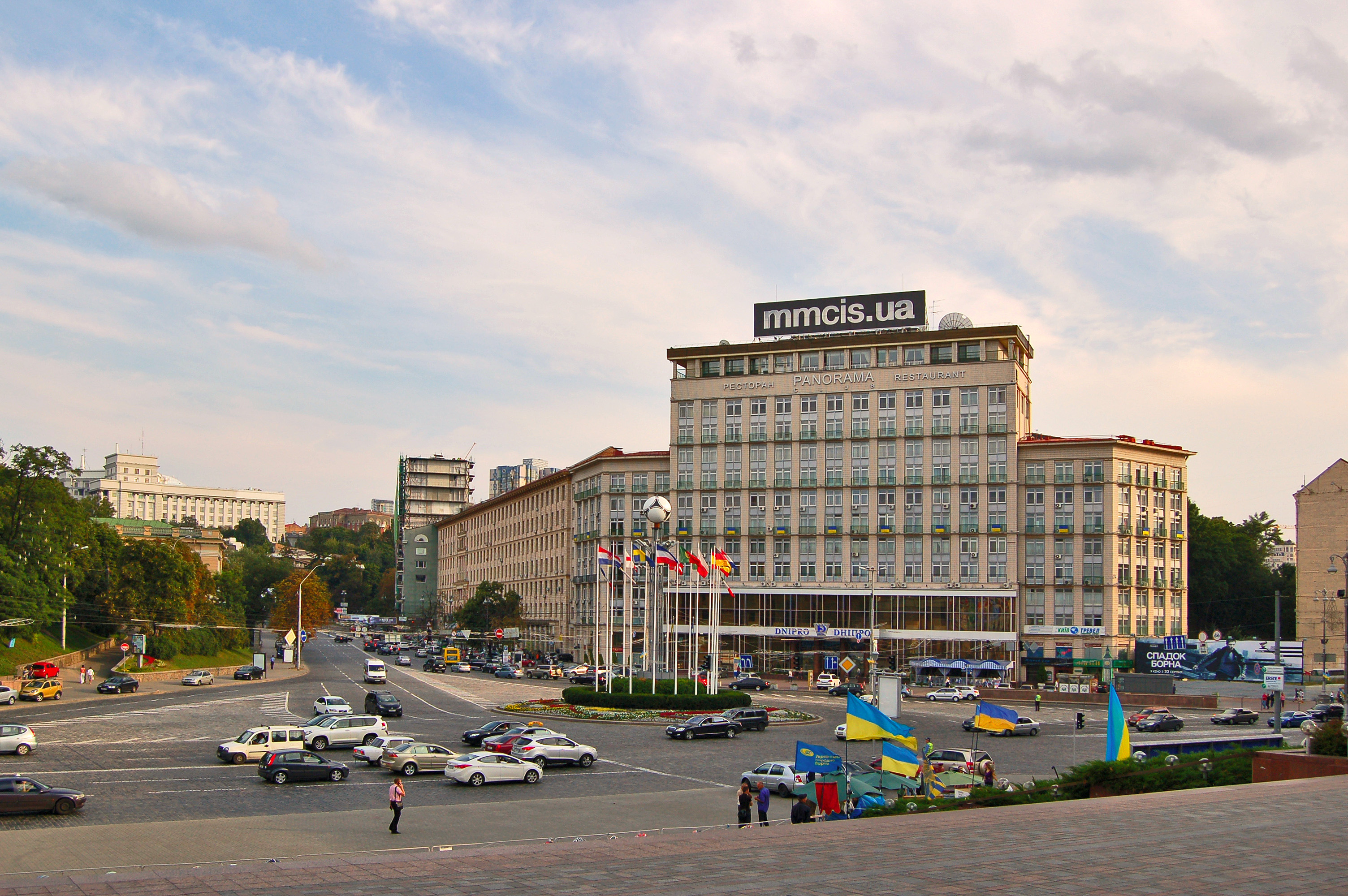 Європейська площа у Києві, вигляд у бік вулиці Михайла Грушевського